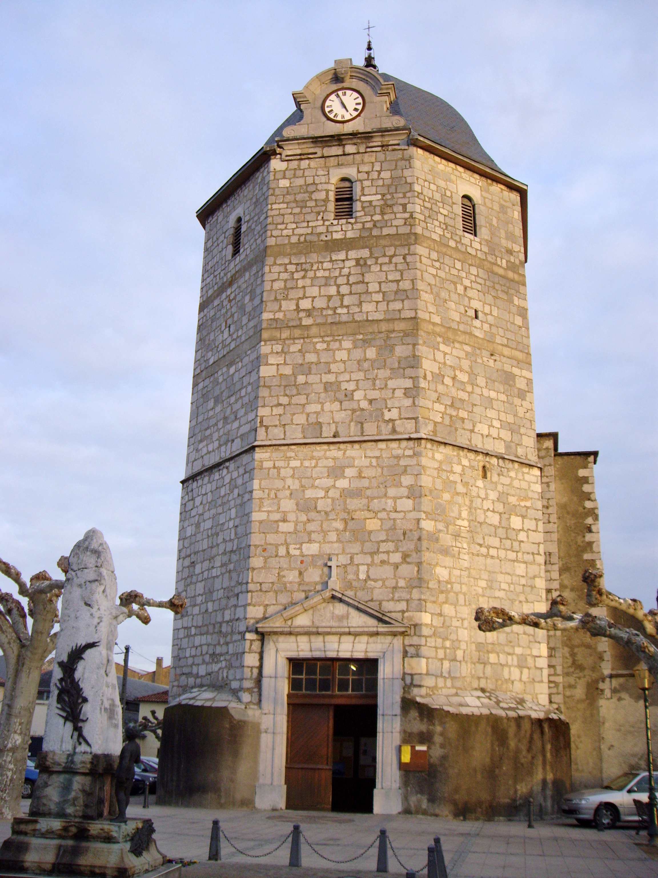 Église Saint-Jean-Baptiste de Montréjeau (Haute-Garonne, France).